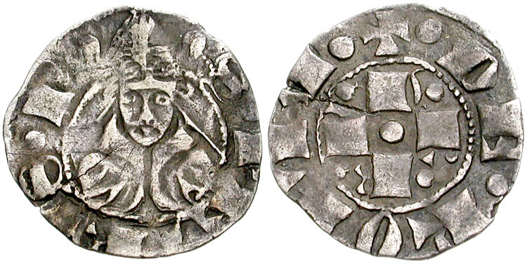 Italia, Stato Pontificio. Gregorius XI. 1370-1378. AR Bolognino (17mm, 0.80 g, 3h). Zecca di Roma, segno di zecca testa di Giovanni Battista. Busto di fronte con mitra +DE ROMA, croce formata dalle lettere •U•R•B•I• intorno ad un cerchio centrale. see Italian medieval coins Italy, Papal States. Anonymous Gregorius XI). 1370-1378. AR Bolognino (17mm, 0.80 g, 3h). Rome mint, mintmark: head of John the Baptist. Facing mitred bust + DE ROMA, cruciform URBI with pellets. Berman 209.